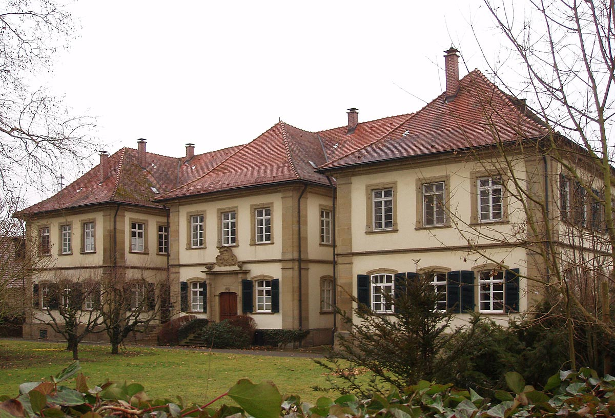 Oberes Schloss in Bad Rappenau-Bonfeld